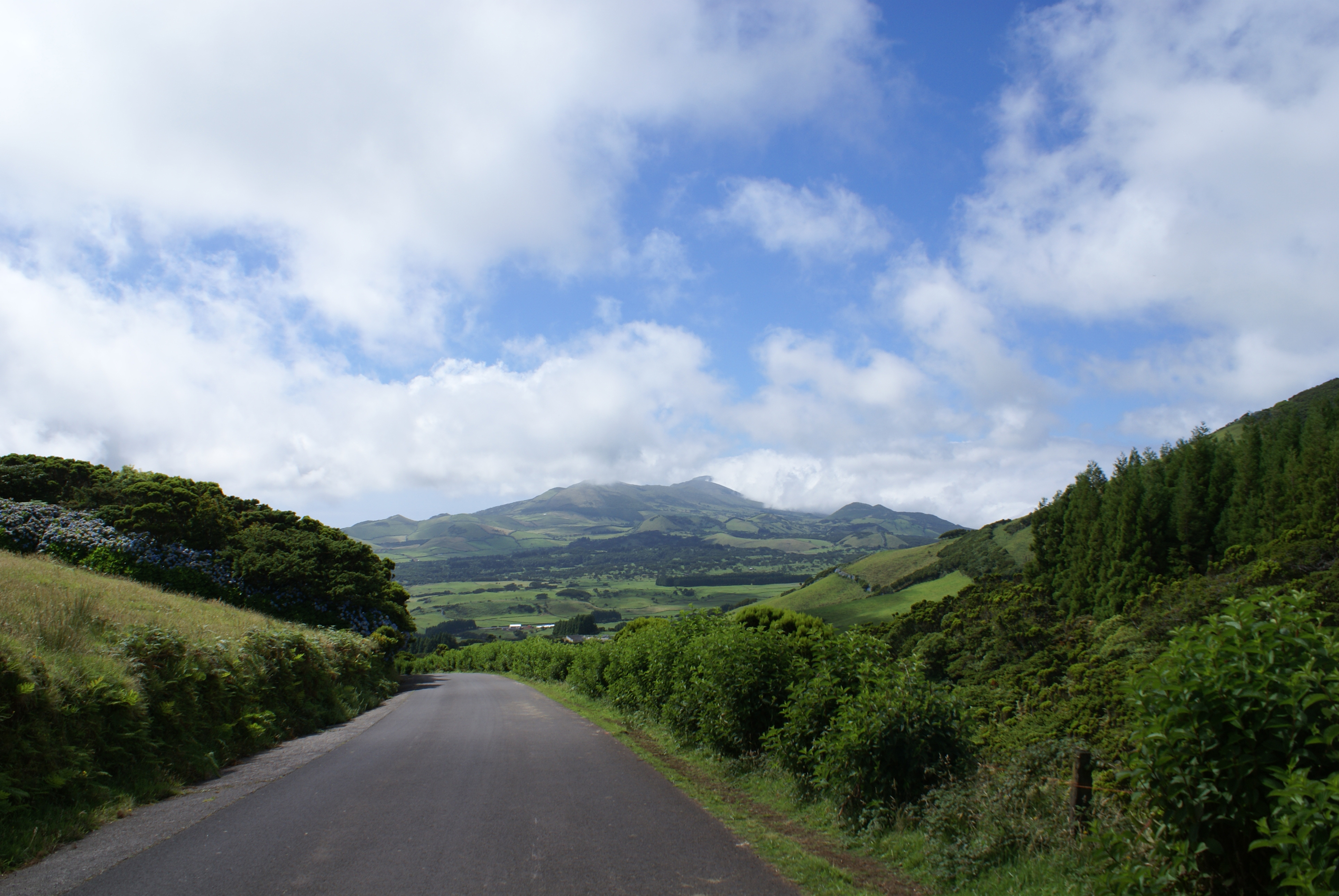 Serra do Topo, as montanhas sucedem-se a estrada sobe a mais de 900 metros de altitude, Calheta, ilha de São Jorge, Açores